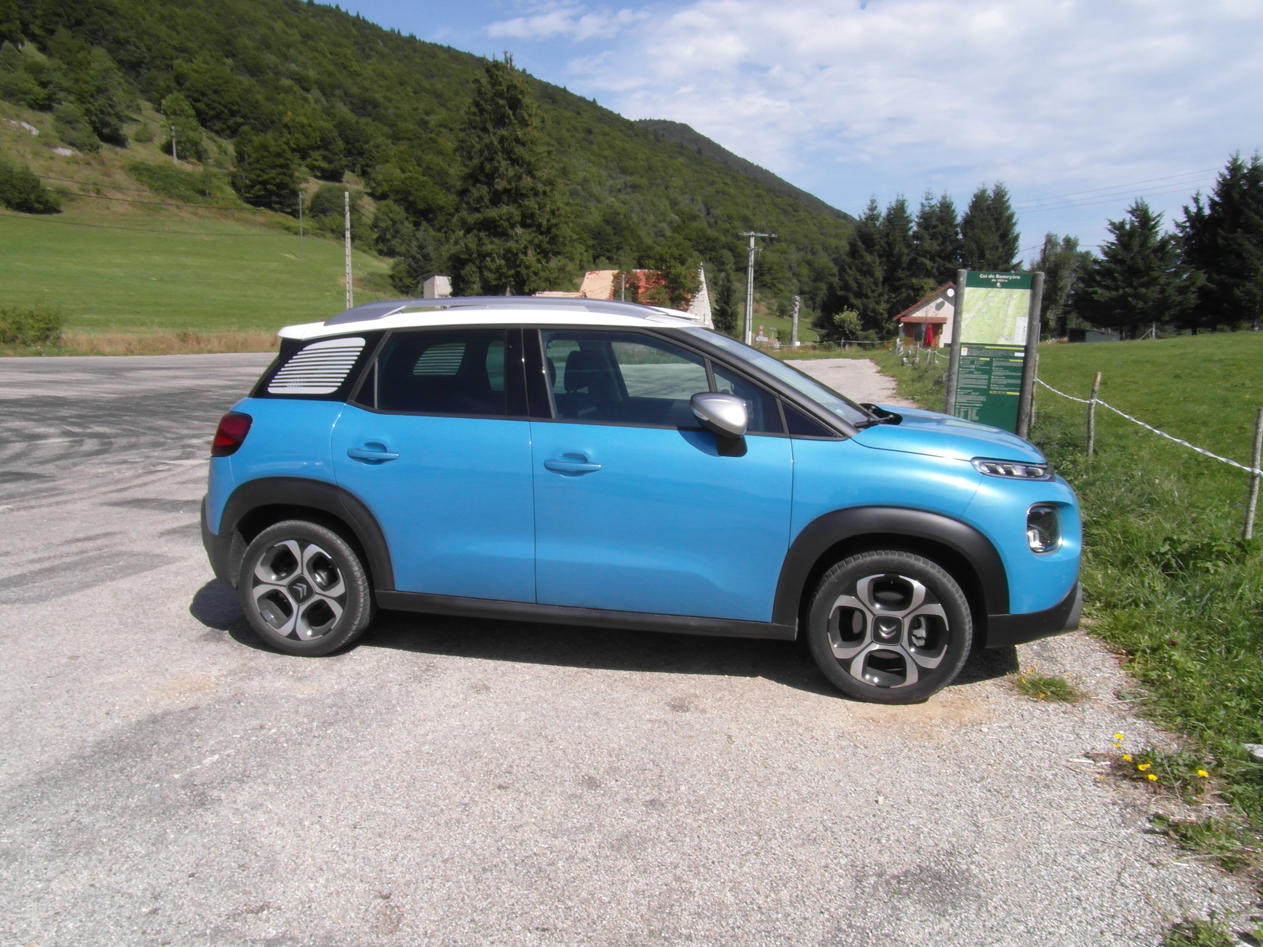 Citroën C3 Aircross (France août 2017)